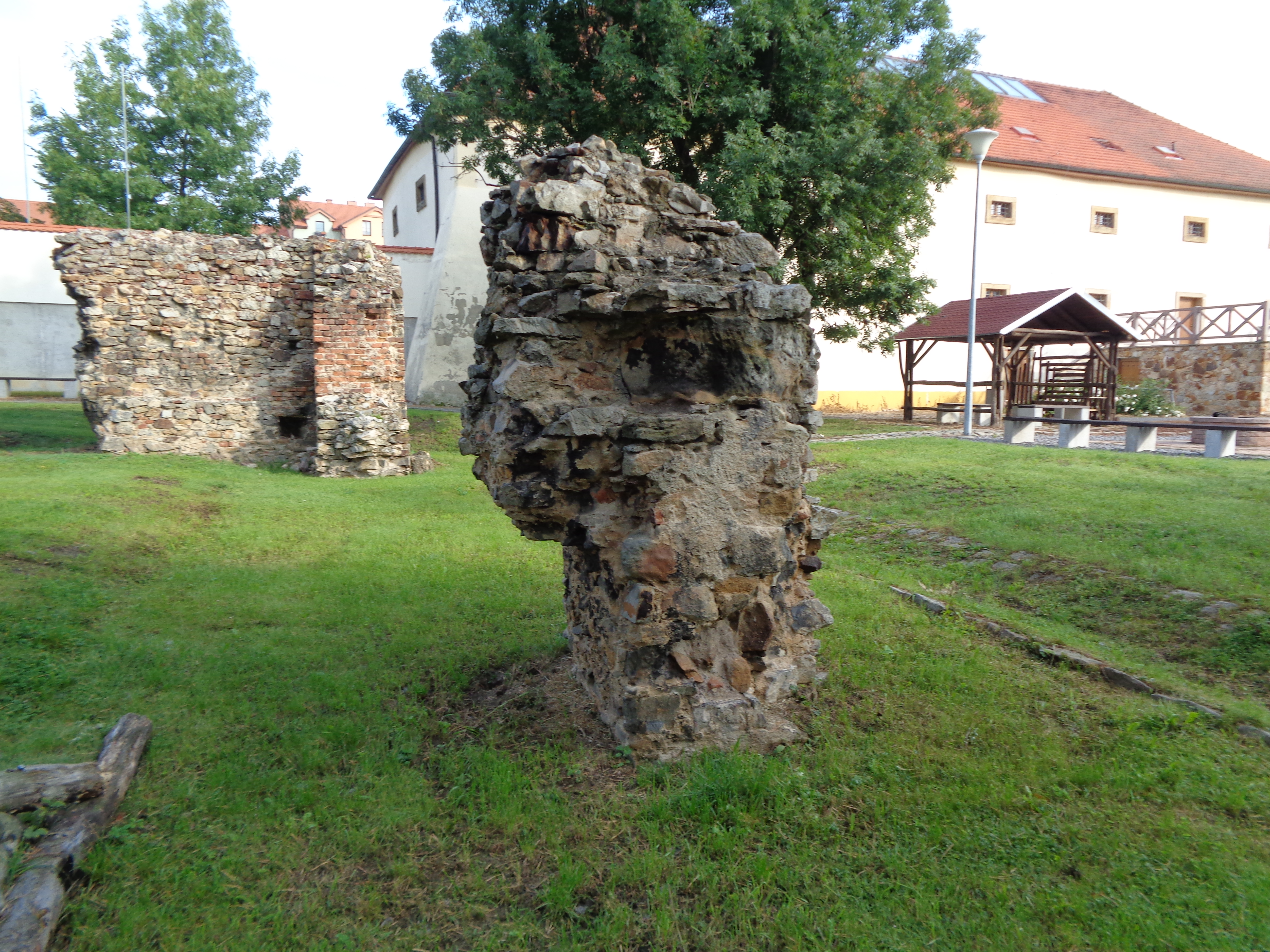 Pohled na tvrziště v Dubči v Panské zahradě, v dáli budova barokního špejcharu.